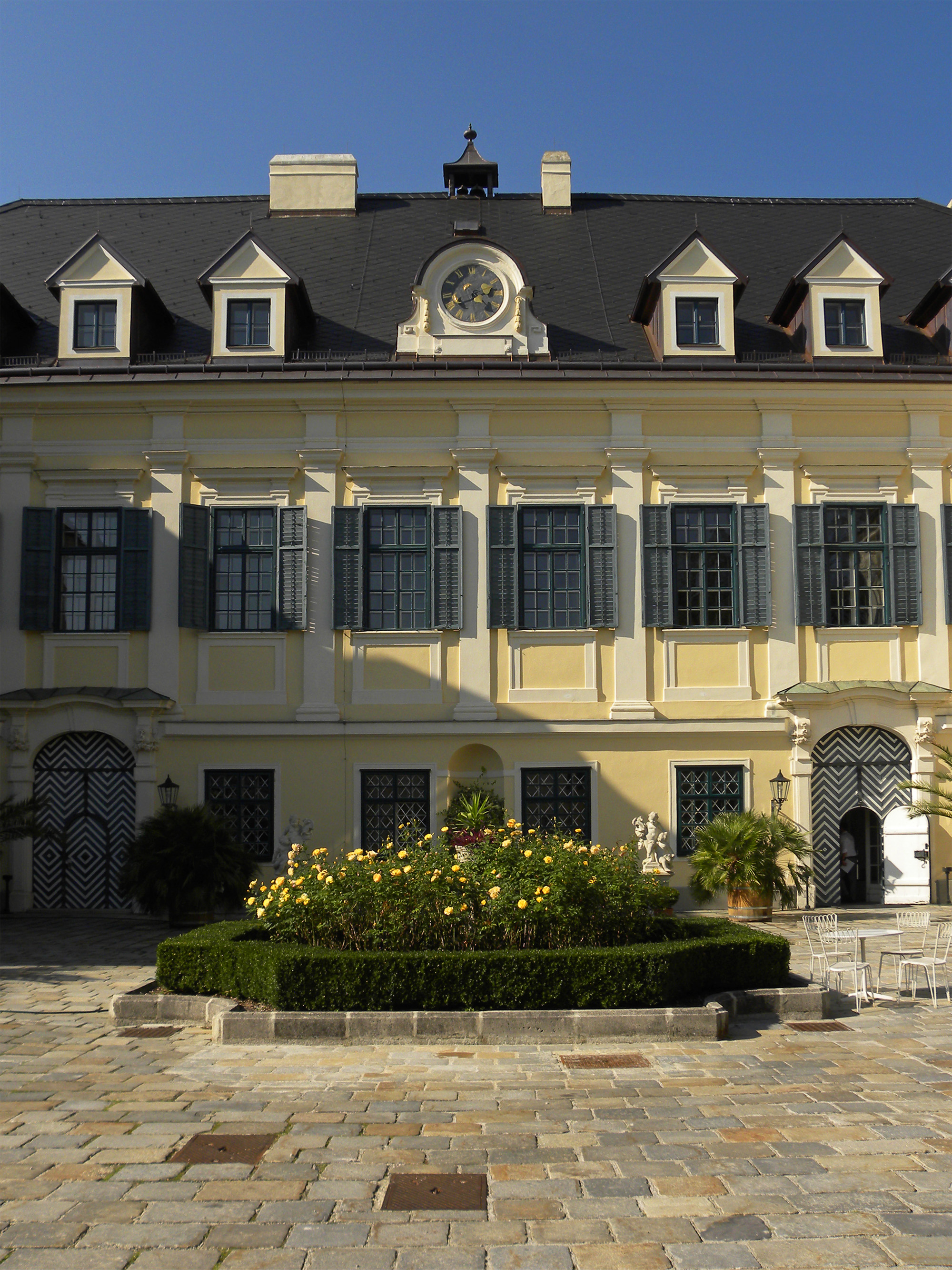 Schloss Laudon